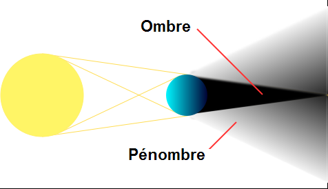 Retouchée depuis File:Umbra01.svg